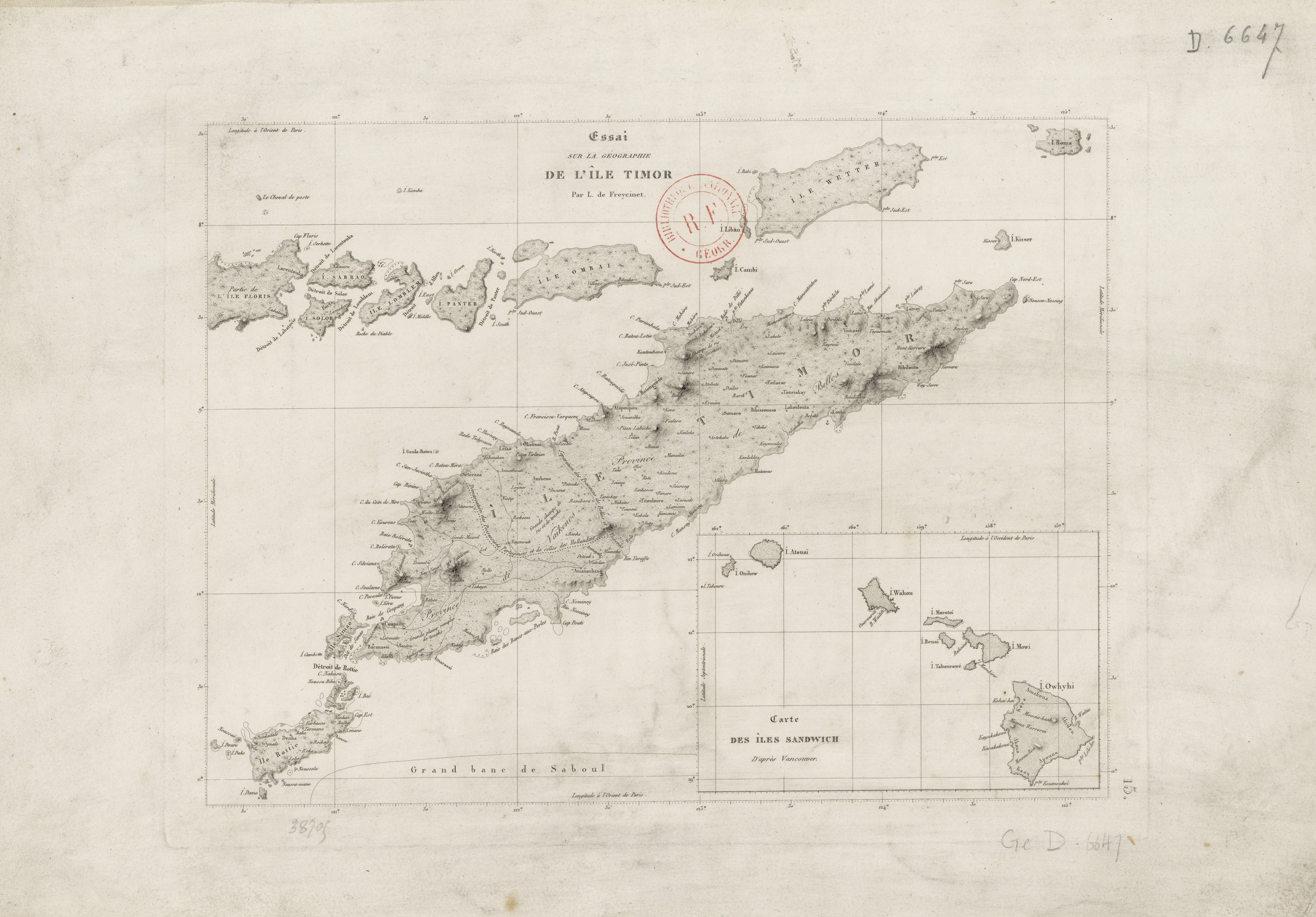 Essai sur la géographie de l'île Timor.